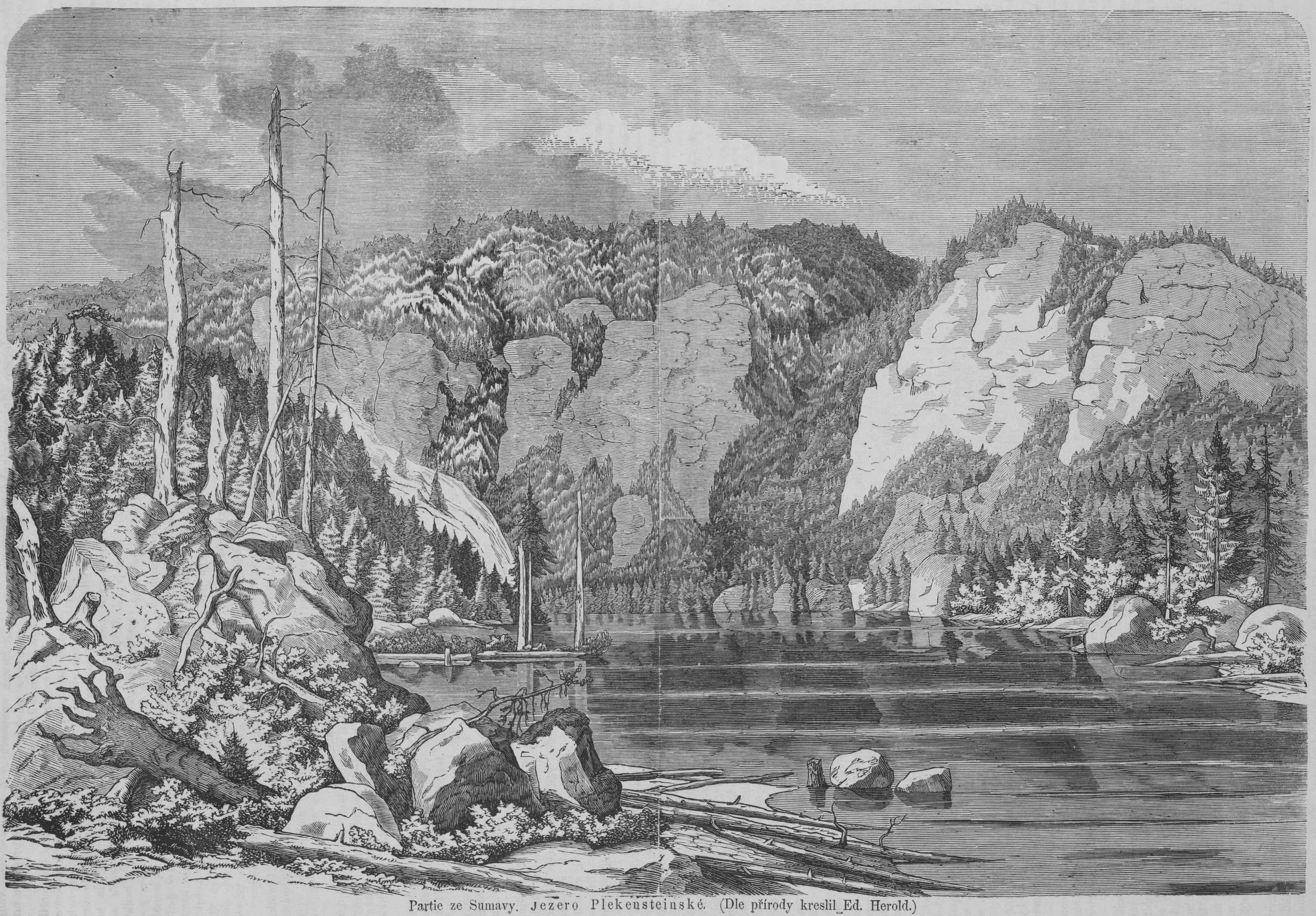 Partie ze Šumavy. Jezero Plekesteinské (dnes Plešné jezero)